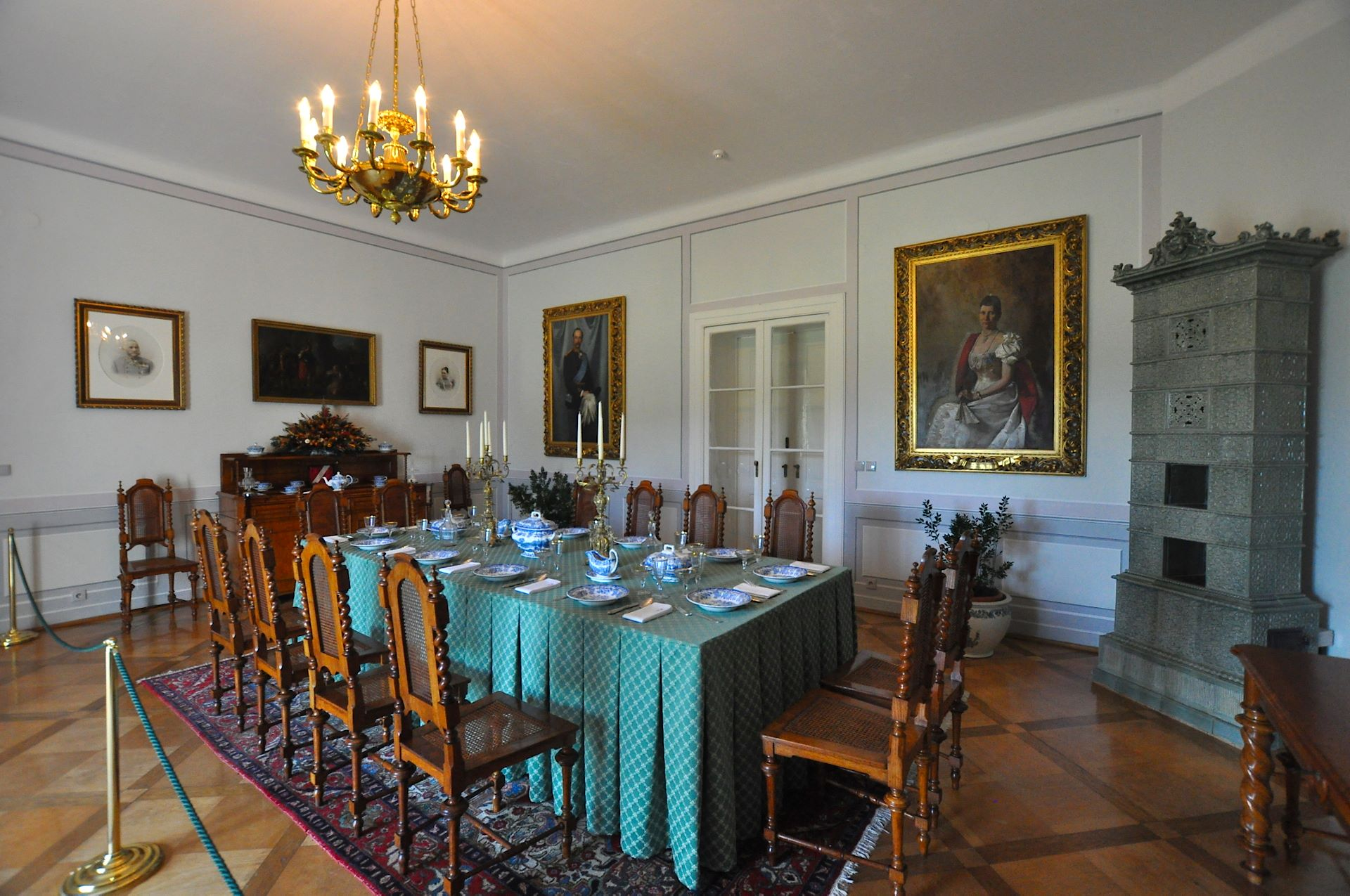 Schloss Ratibořice